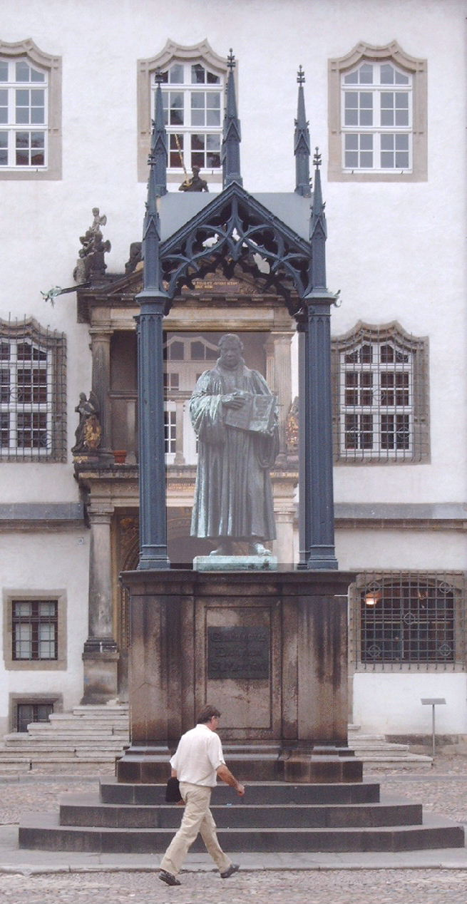 Lutherdenkmal auf dem Marktplatz in Lutherstadt-Wittenberg Den Grundstein für das Denkmal legte am 1. November 1817 anlässlich der dritten Säkularfeier der Reformation König Friedrich Wilhelm III.. Die Enthüllung erfolgte zum Reformationsfest 1821. Entwurf: Johann Gottfried Schadow Motiv: Luther steht im Predigergewand mit der Bibel in den Händen Sockel: Granit Inschriften auf dem Sockel: Ist's Gottes Werk, so wird's bestehn, Ist's Menschenwerk, wird's untergehn (Ostseite) Von dem mannsfeldischen Verein für Luthers Denkmal durch gesammelte Beiträge gegründet und durch König Friedrich Wilhelm III errichtet (Nordseite) Eine feste Burg ist unser Gott (Westseite) Glaubet an das Evangelium (Südseite) Aufnahme: 24.8.2004 Url